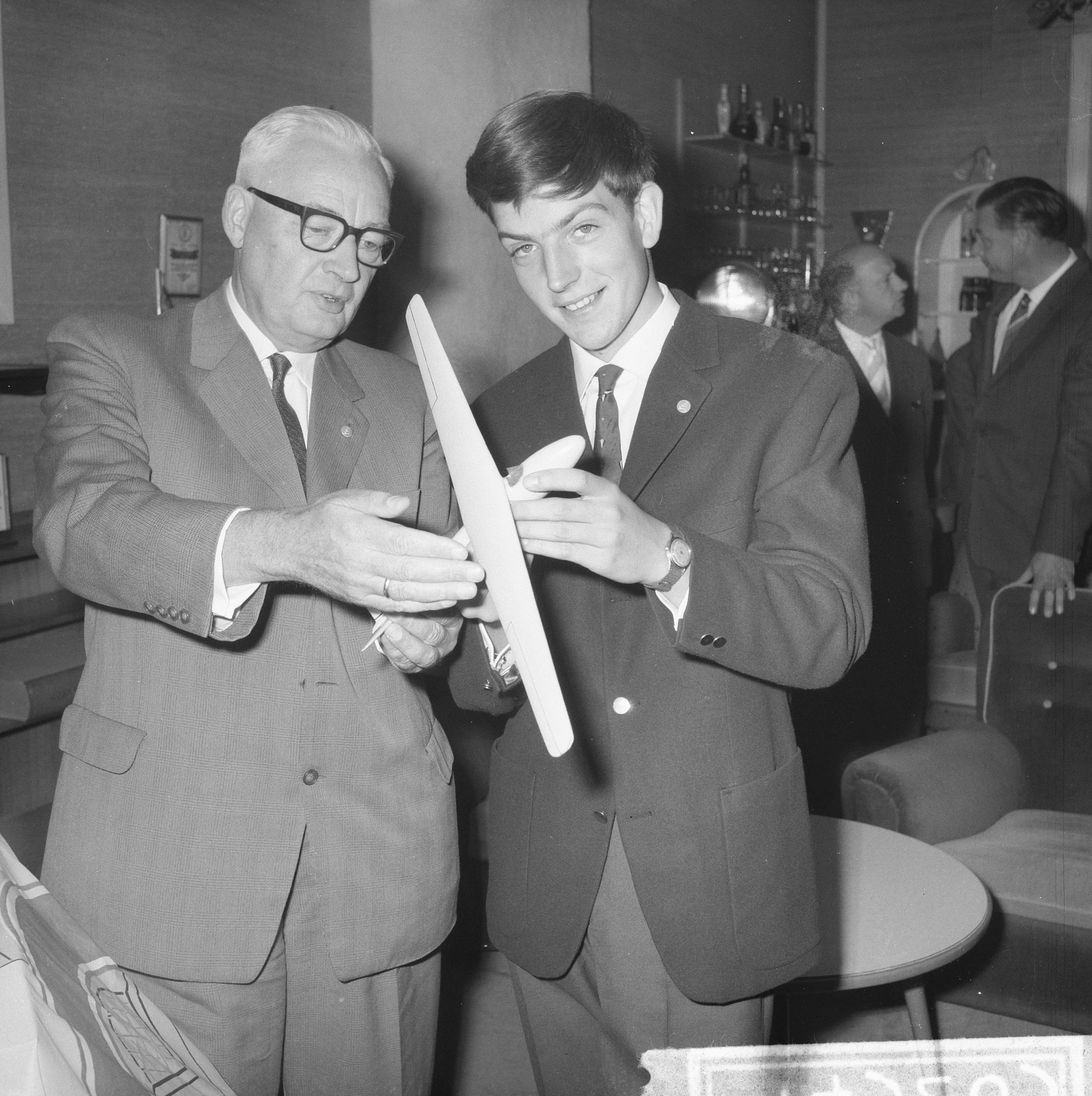 Collectie / Archief : Fotocollectie Anefo Reportage / Serie : [ onbekend ] Beschrijving : Duizendste zweefvliegtuigbewijs uitgereikt aan Toon Buyz ( 16 jaar ) in gesprek met dr. ir. Van der Maas Datum : 20 september 1962 Persoonsnaam : dr. ir. Van der Maas Fotograaf : Nijs, Jac. de / Anefo Auteursrechthebbende : Nationaal Archief Materiaalsoort : Negatief (zwart/wit) Nummer archiefinventaris : bekijk toegang 2.24.01.03 Bestanddeelnummer : 914-3263